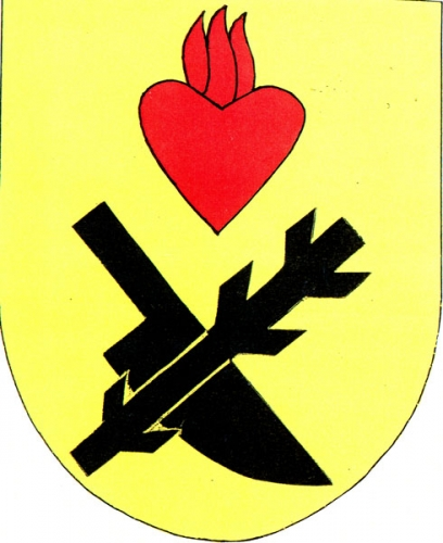 znak, Oslnovice, okres Znojmo